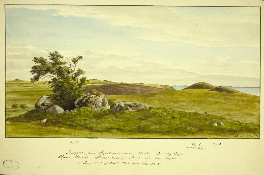 Prospekt af Hjortegårdens marker. I forgrunden fredlyste høje på matr. 8. Set mod syd. Akvarel af A.P. Madsen 1882. Dråby sogn.